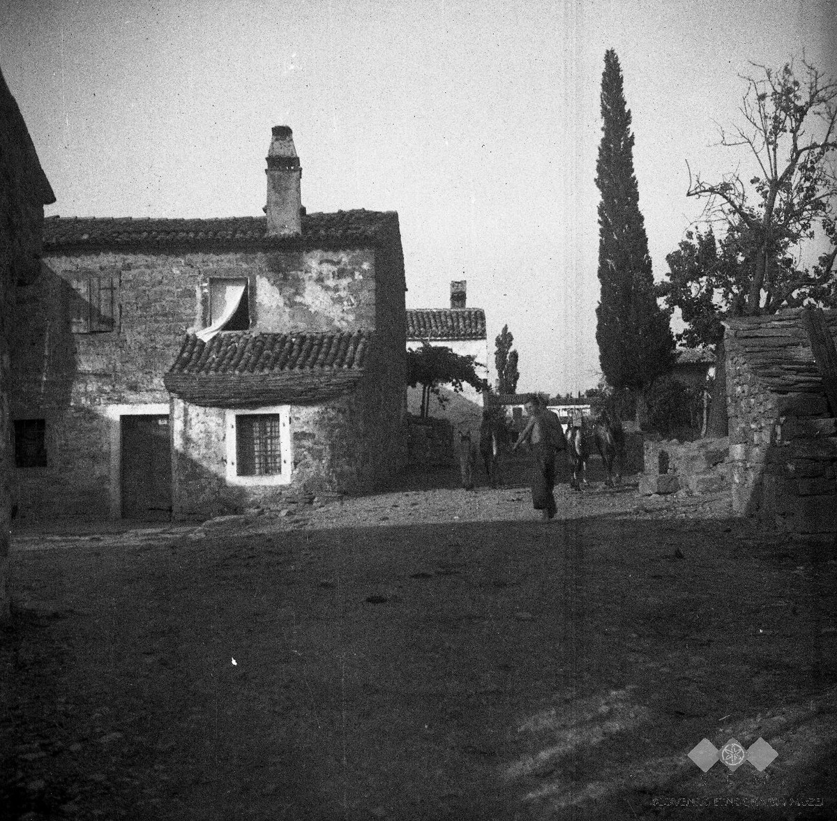 Ulica v Loparju.